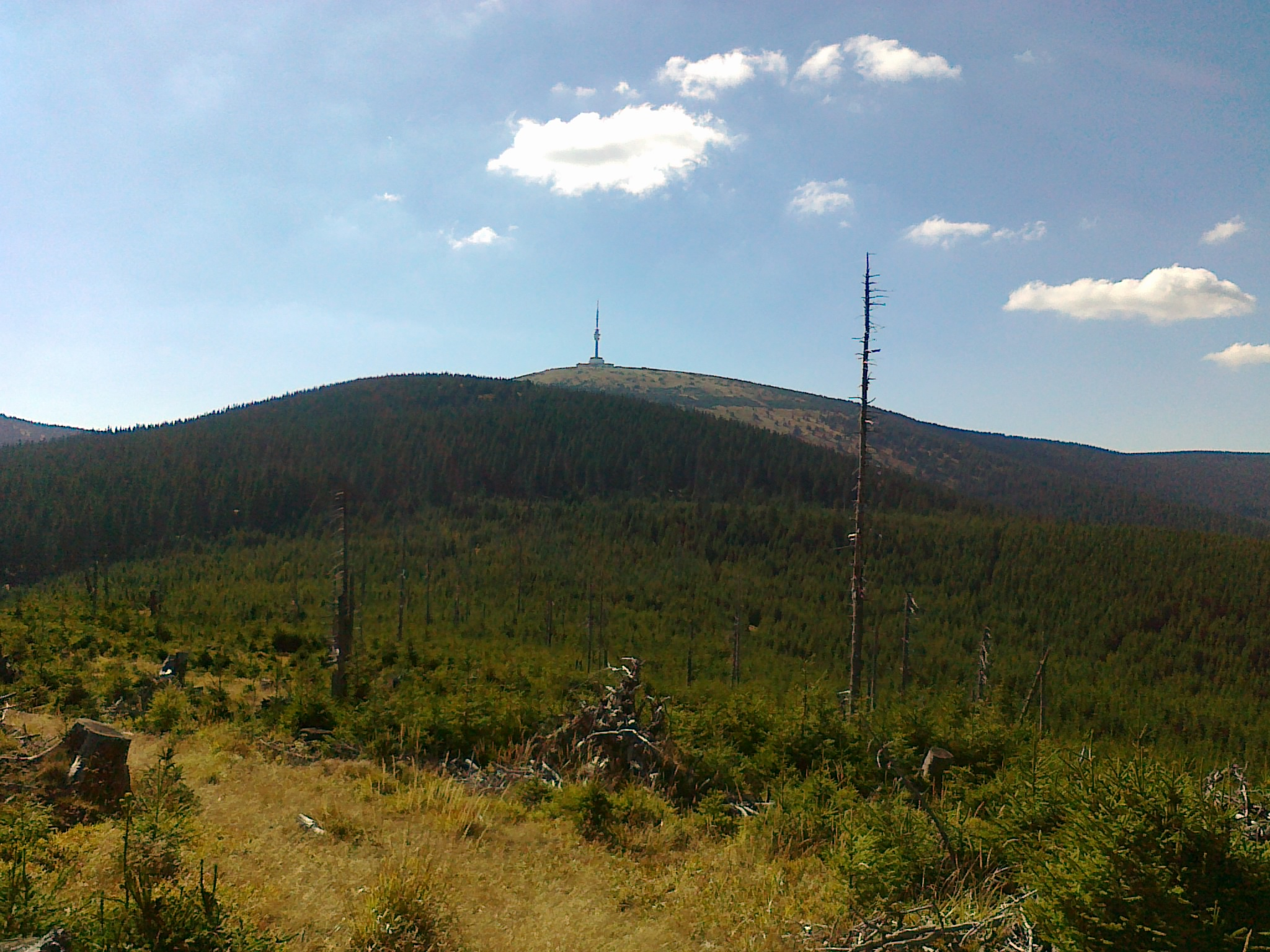 Widok ze szczytu góry Ostrý vrch na szczyty Praděd-V - 1356 m n.p.m. i Praděd - 1491 m n.p.m.